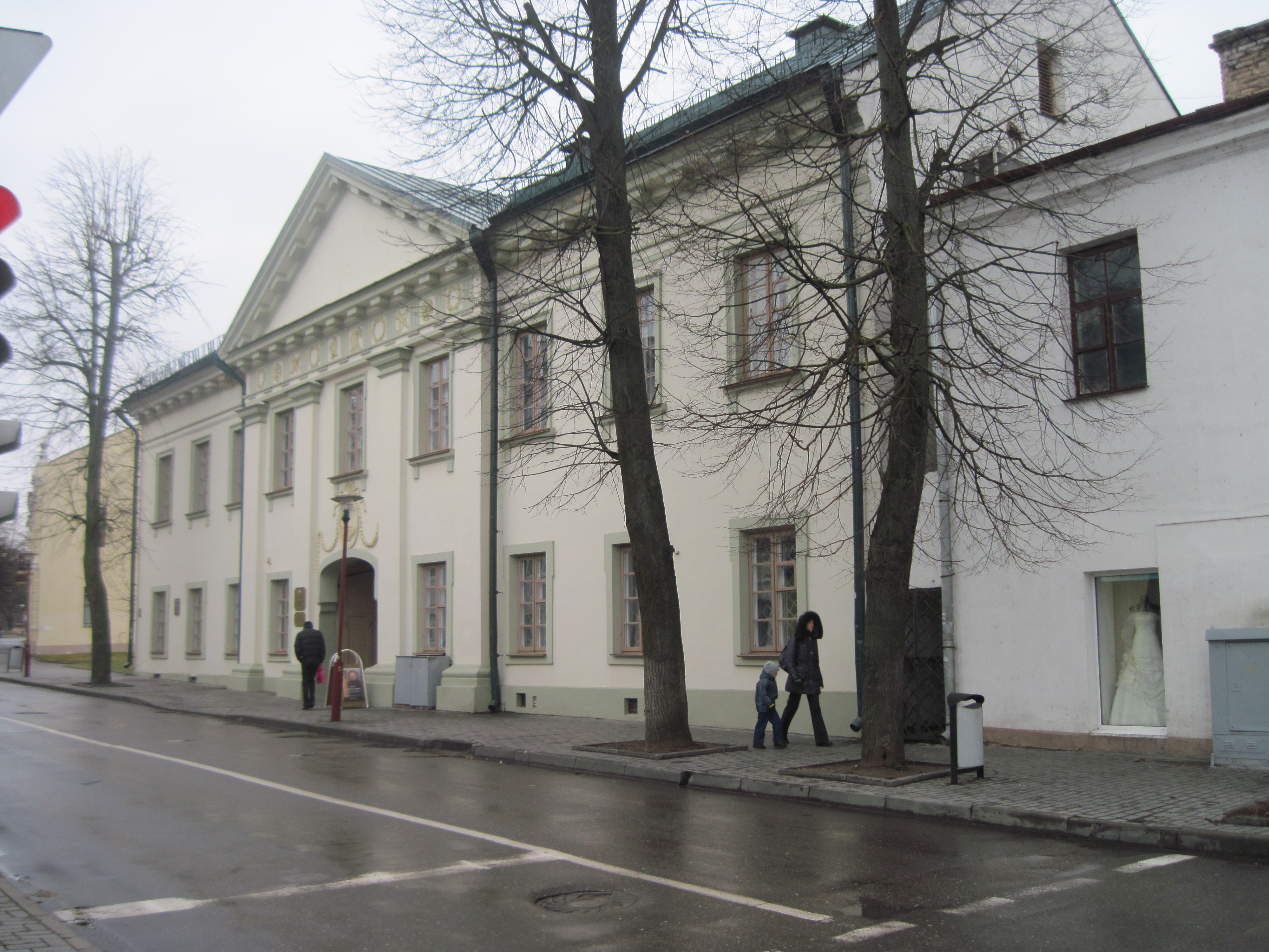 Беларуская (тарашкевіца): Будынак у Гродна, в. Замкавая, 16